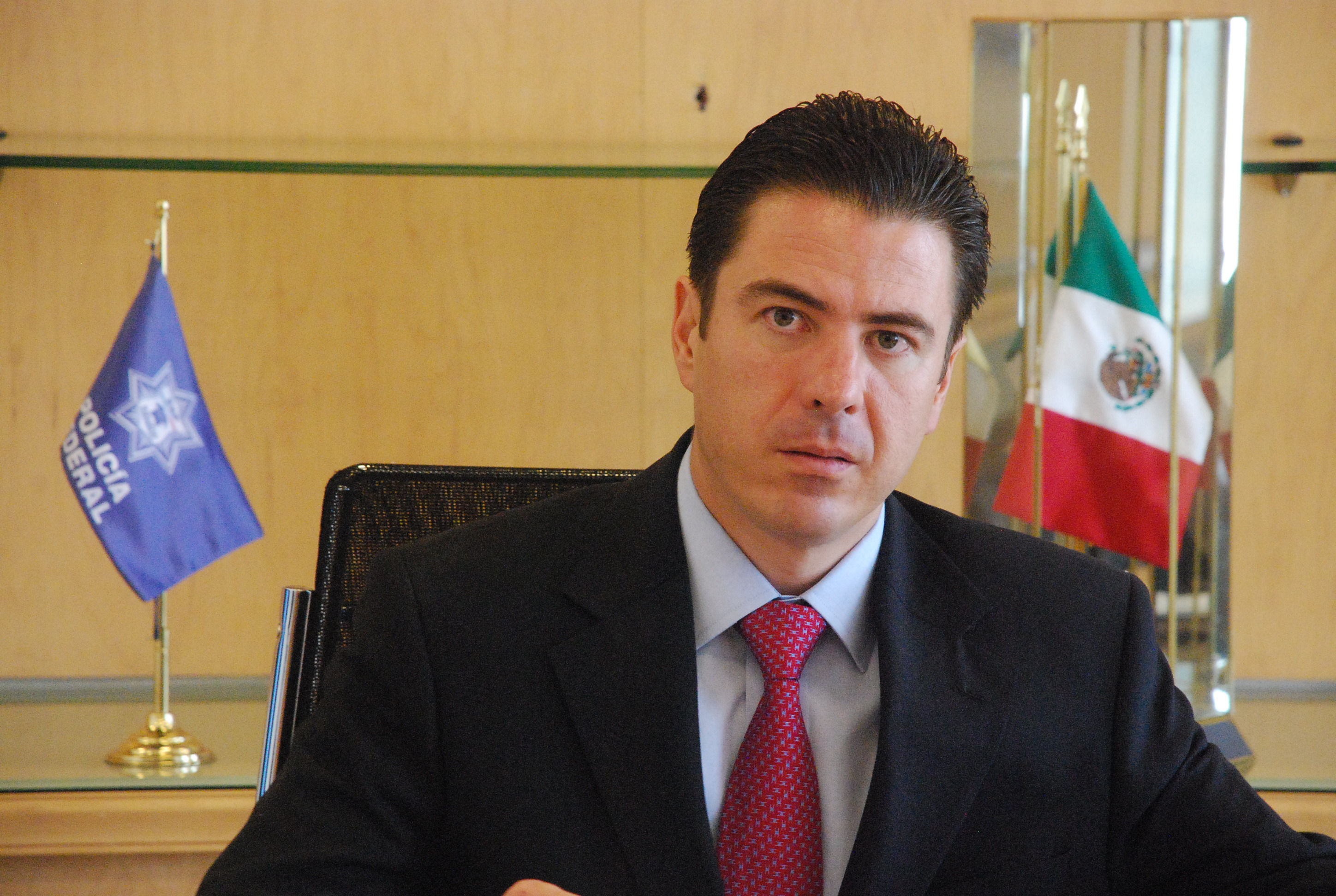 Luis Cárdenas Palomino, actual Titular de la División de Seguridad Regional de la SSPF